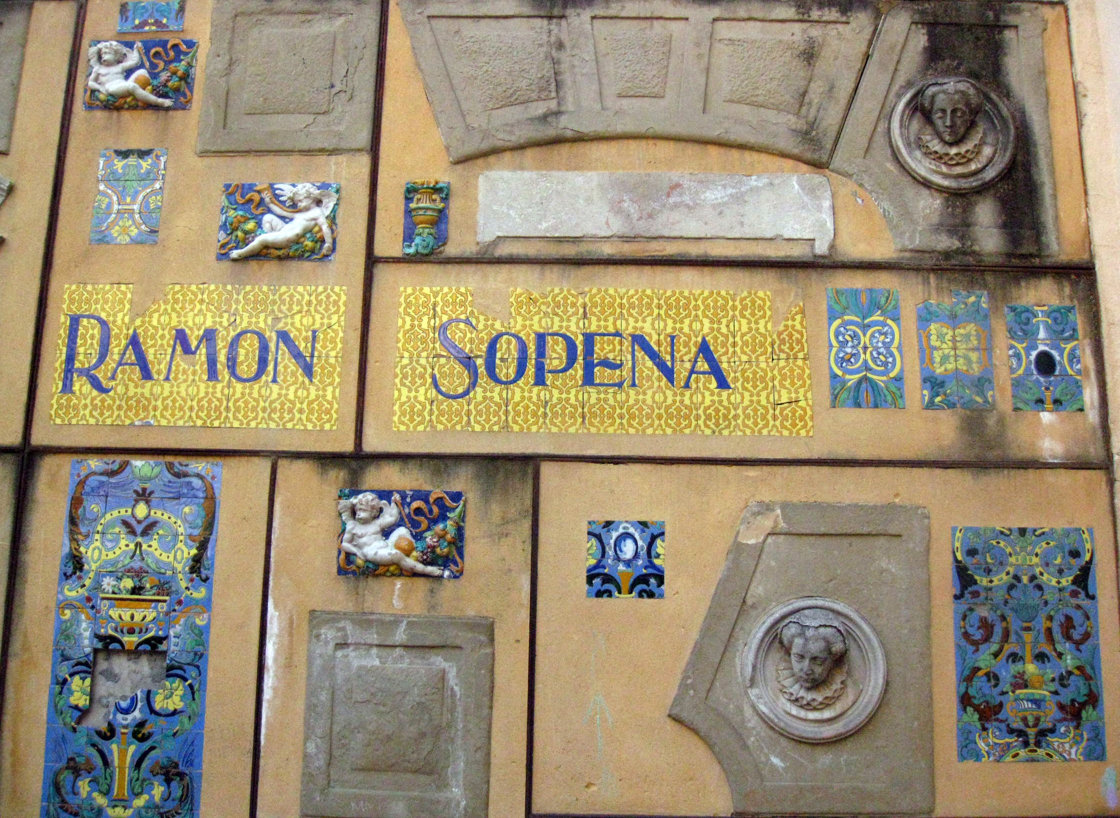 Mural de l'Editorial Sopena (Jordi Gispert). Jardins de Maria Mercè Marçal, accés per c. Provença, 93-97 (Barcelona)